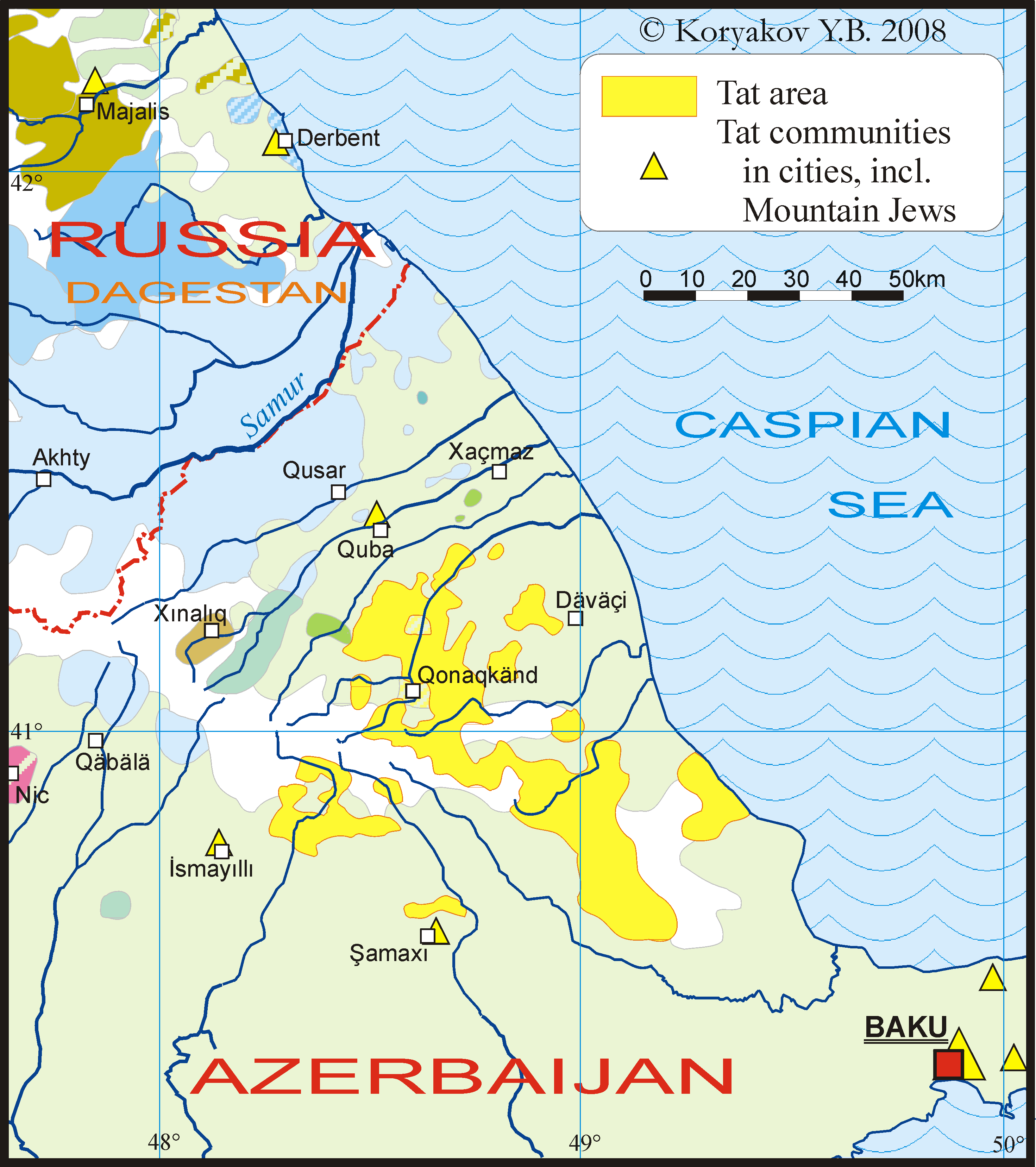 Tat language area